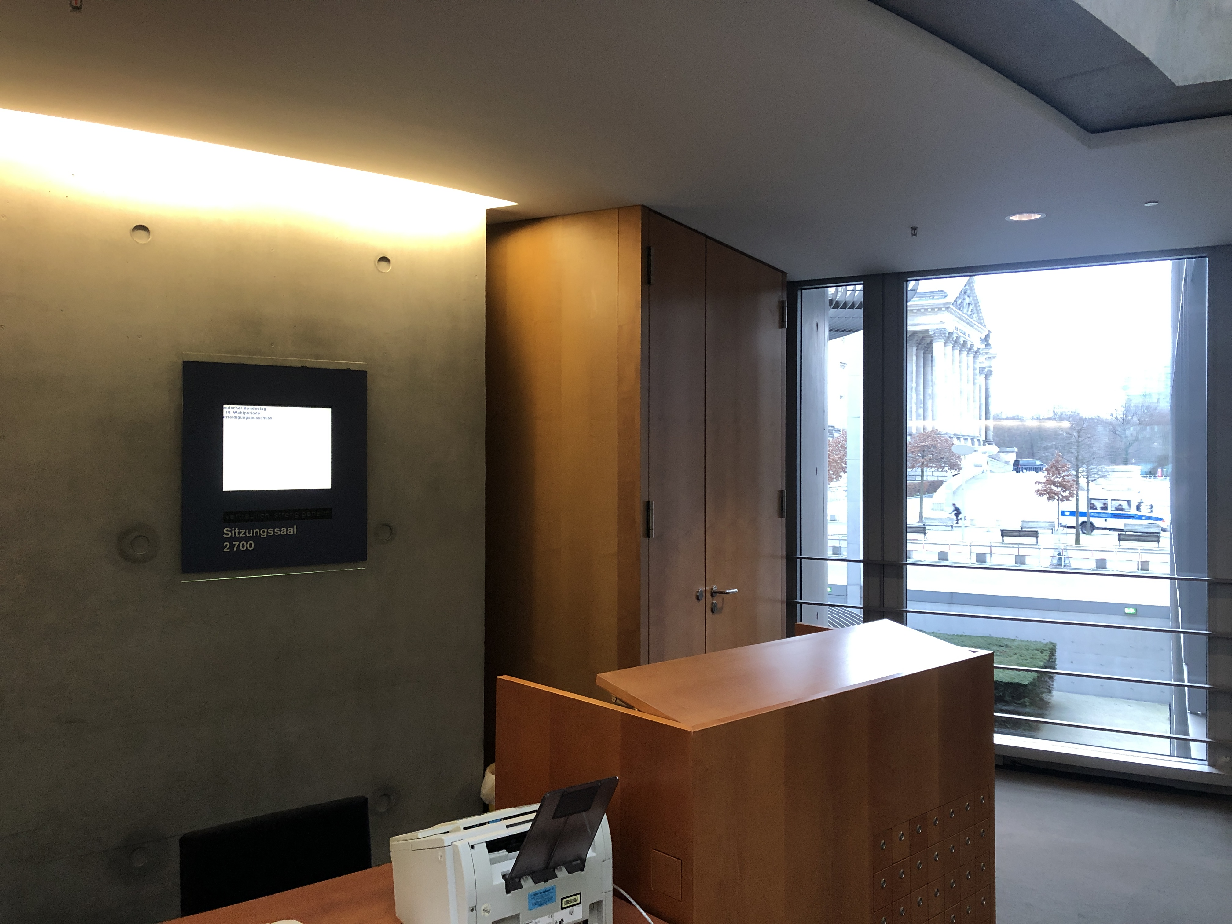 Der Eingang des Sitzungssaales des Verteidigungsausschusses im Paul-Löbe-Haus